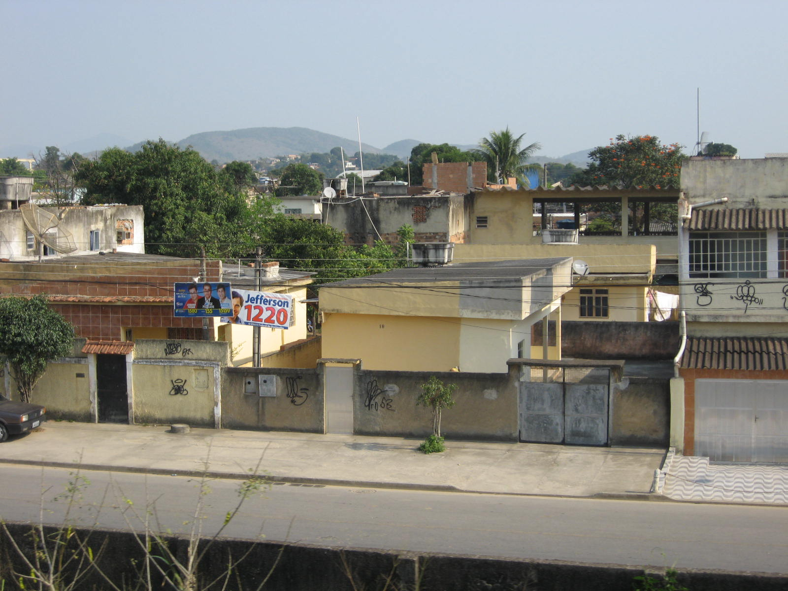 Vista da cidade de Queimados.